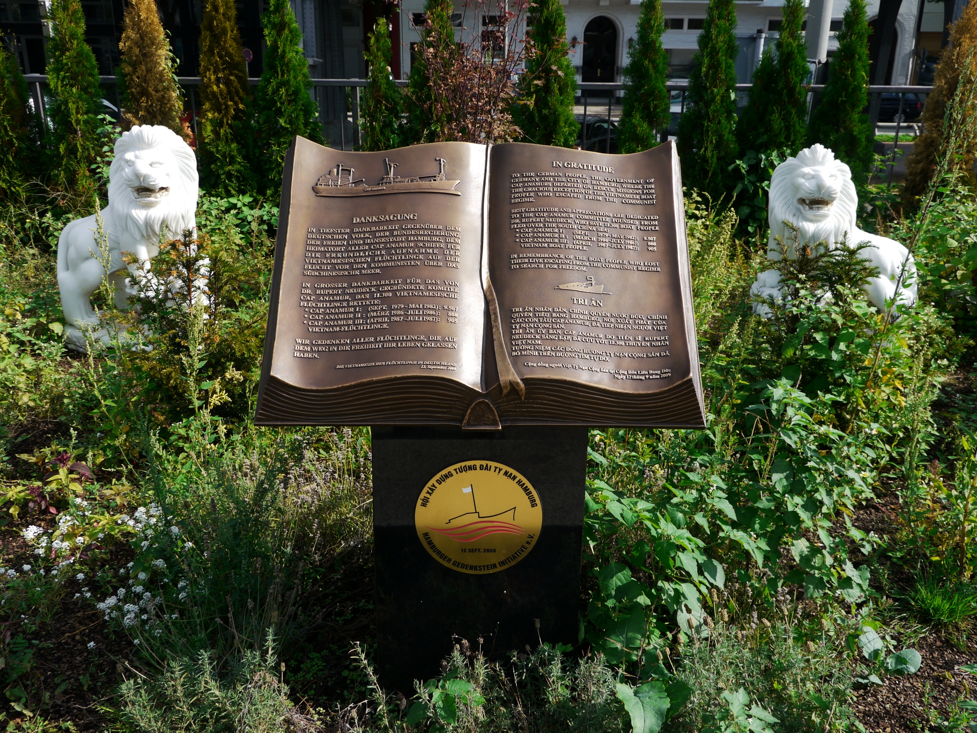 Cap Anamur Gedankstätte am Johannisbollwerk